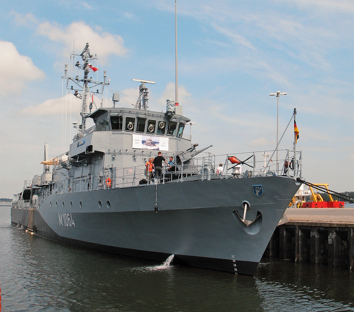 Dieses Bild zeigt das Minenjagdboot M1064 Grömitz im Hafen von Stralsund.